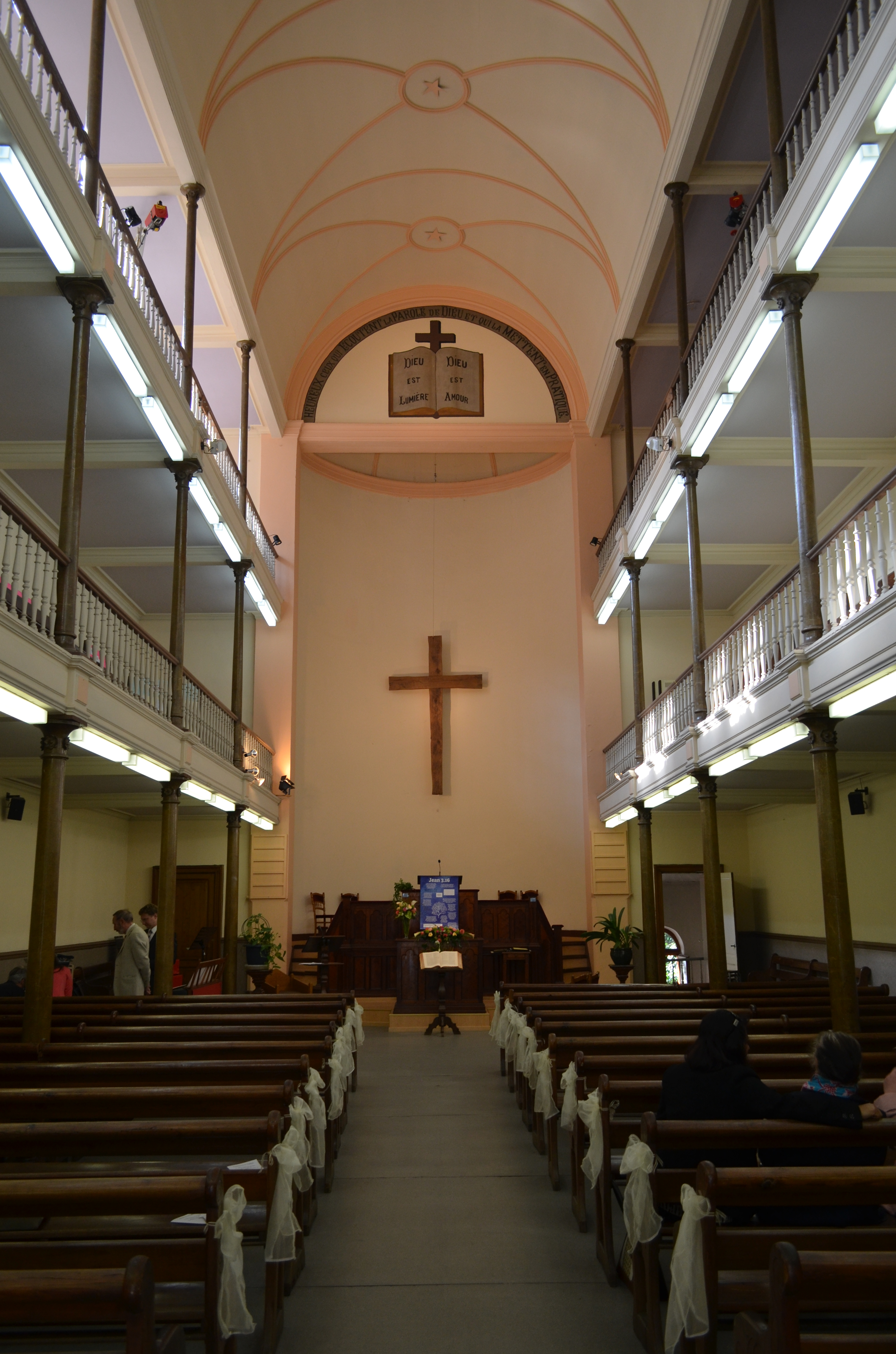 Charleroi (Belgique) - Temple protestant - Construction 1880 - architecte E. Dubois. Bâtiment classé en 1990.